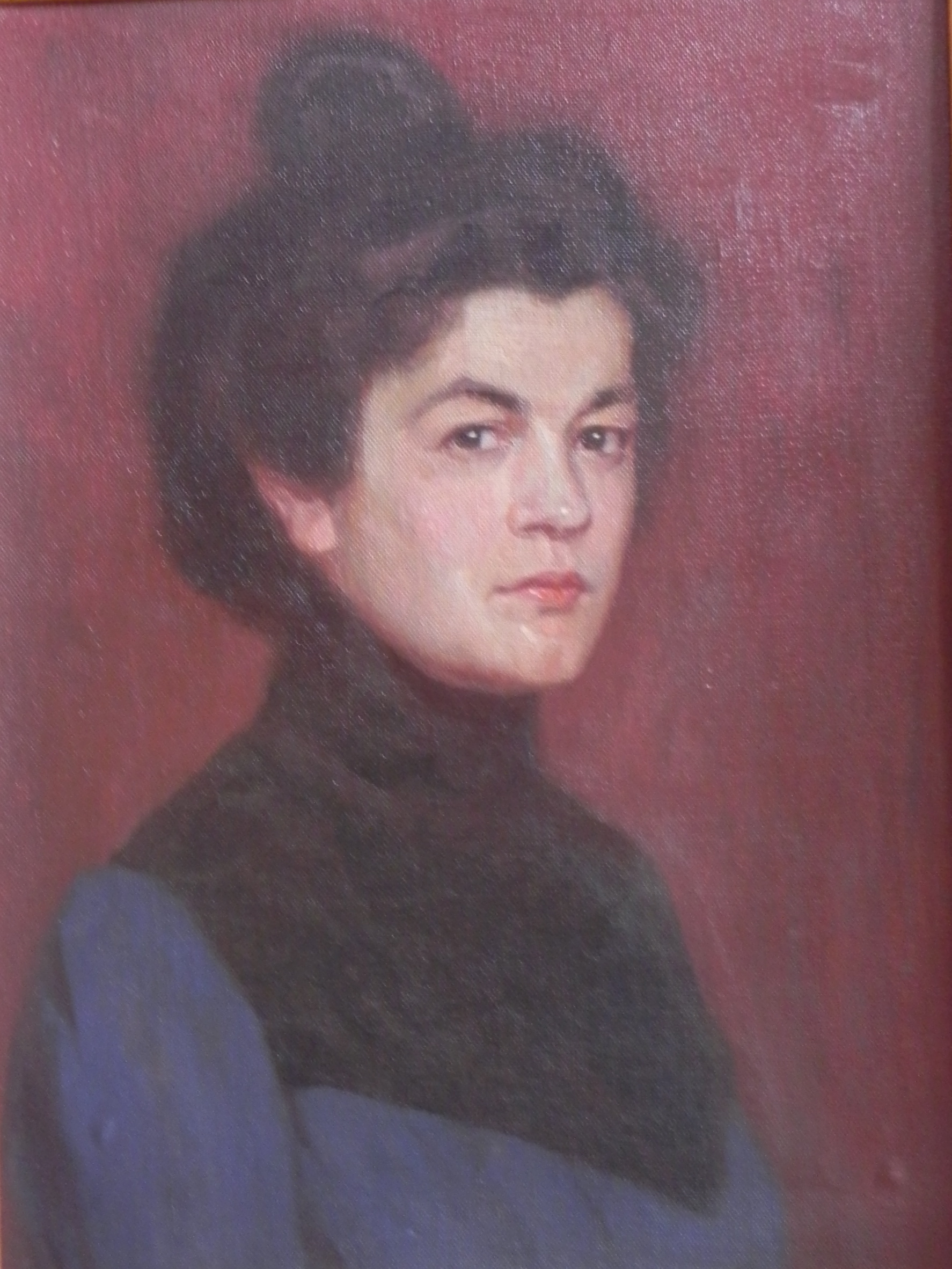 Selbstportrait von 1901, Oelbild